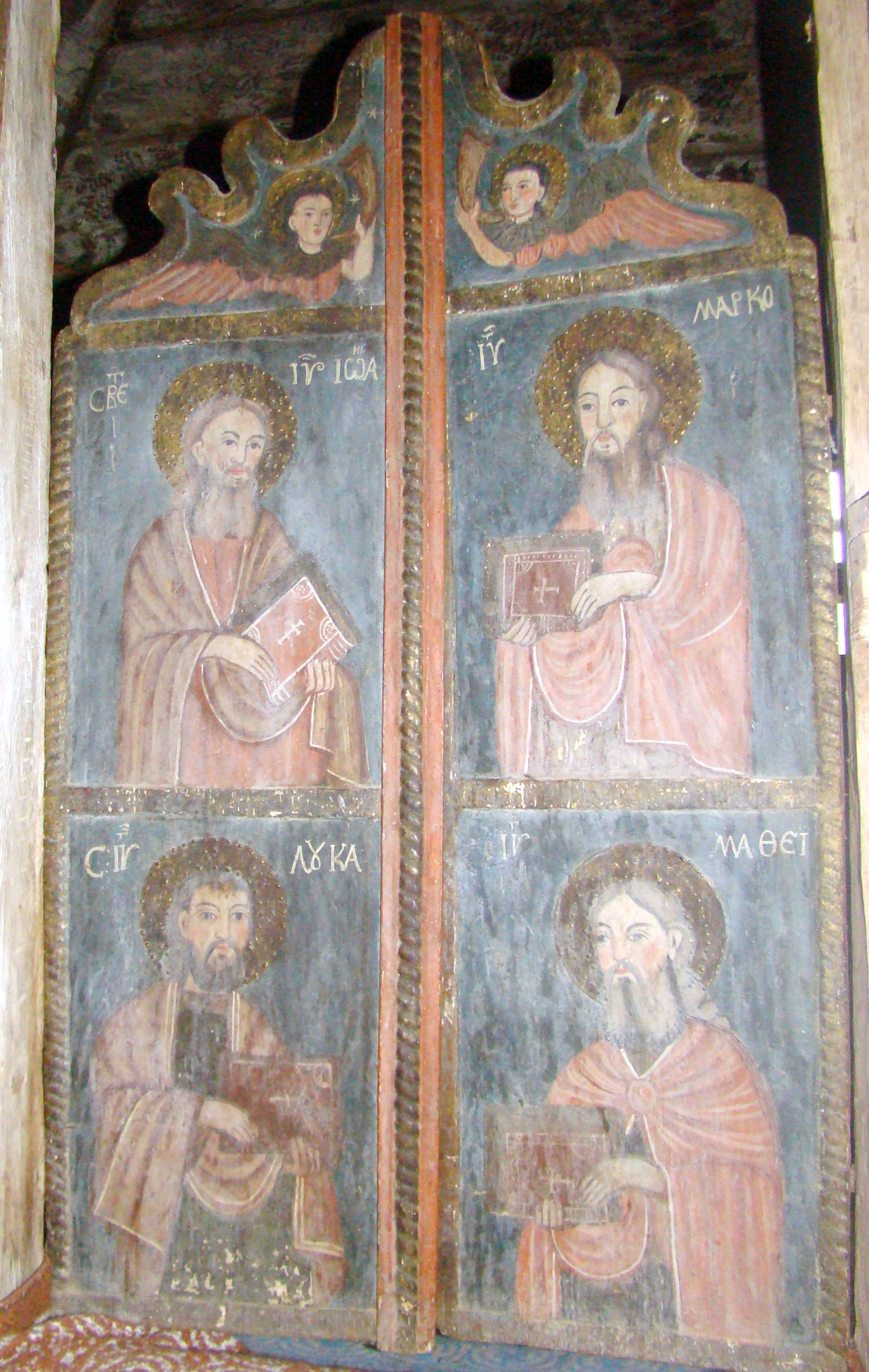 Biserica de lemn din Strugureni, Bistrița-Năsăud